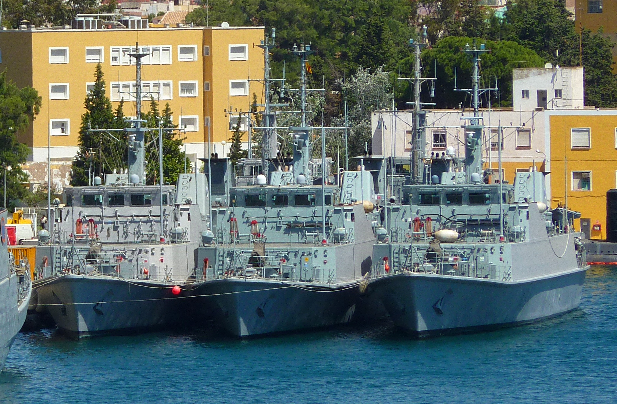 Tres cazaminas clase Segura de la Armada Española